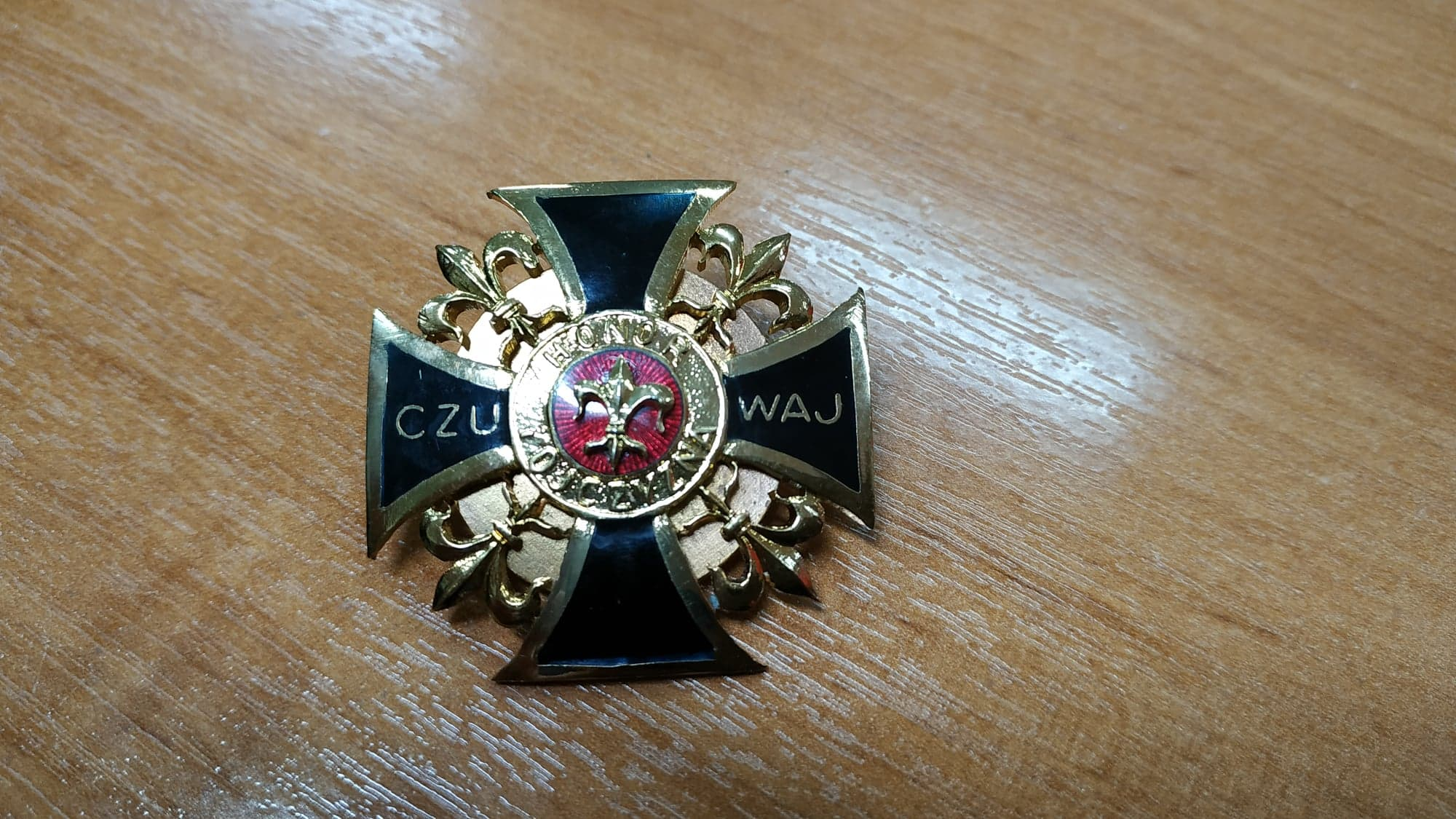 Honorowy Krzyż Harcerski z Czasów Walk o Niepodległość